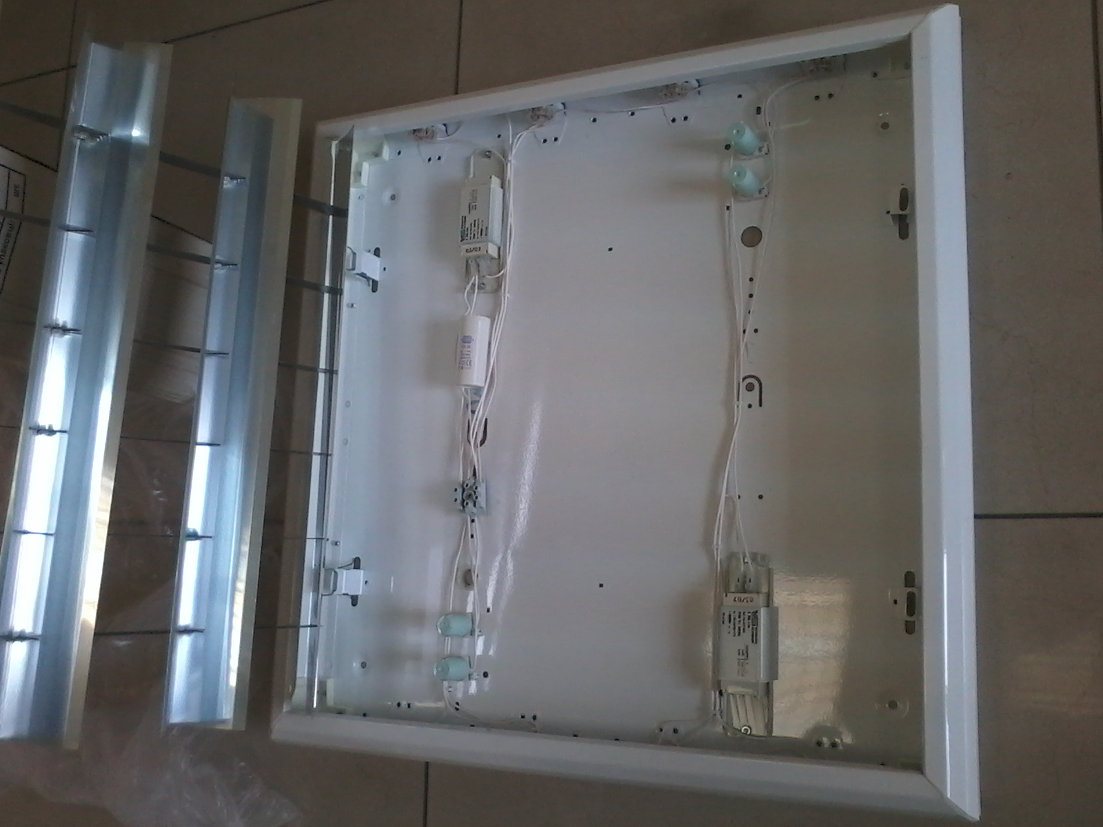 растровий світильник